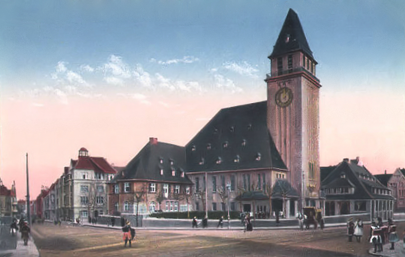 Apostelkirche in Essen-Frohnhausen um 1914